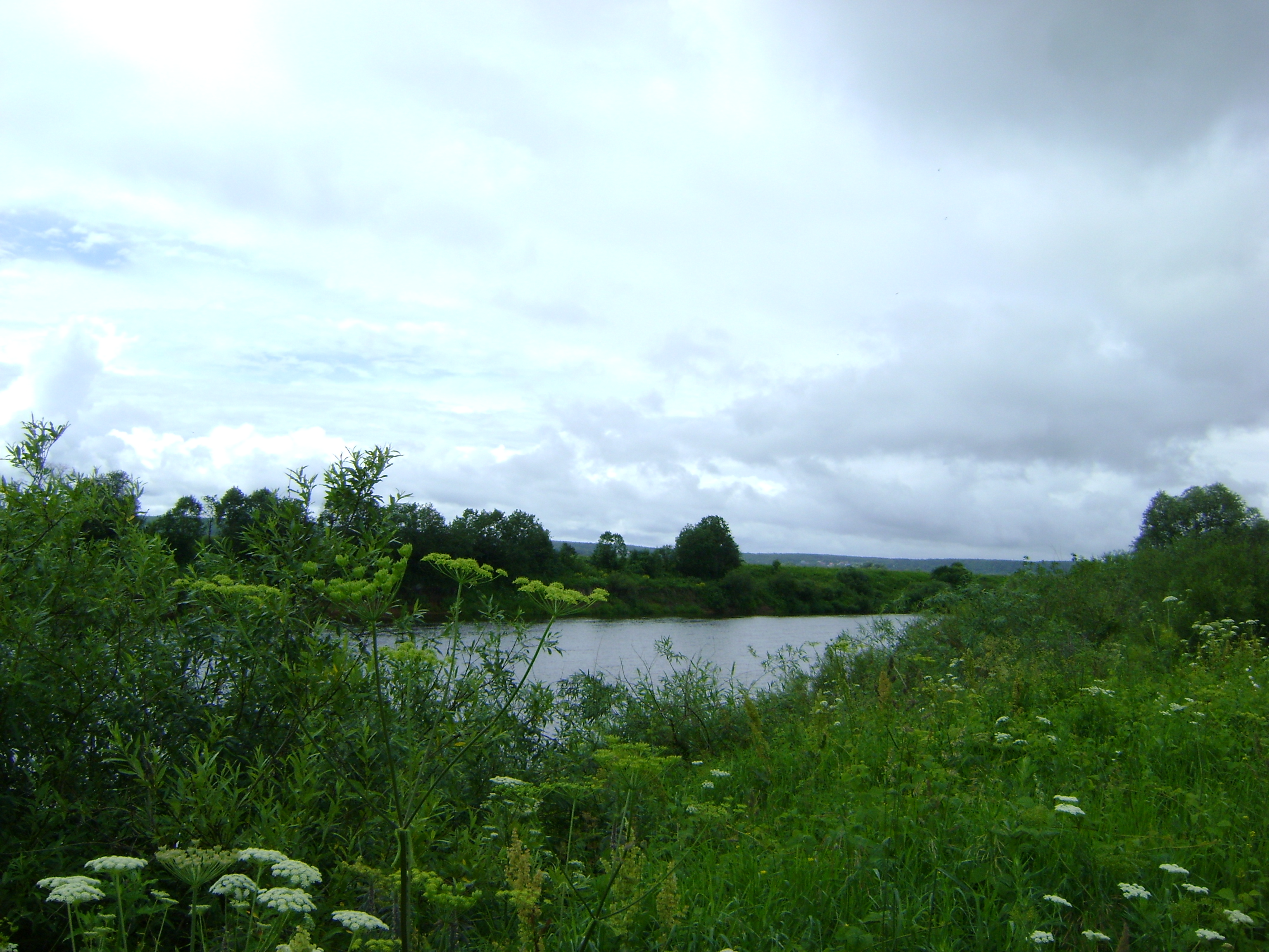 Калузька область, Росія.